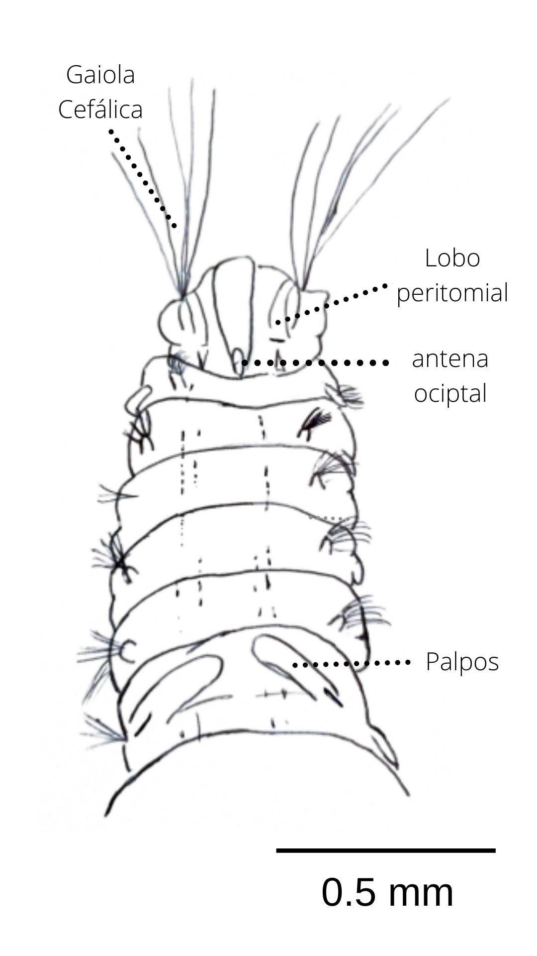 Vista dorsal da região anterior de Uncispionidae (adaptado de Darbyshire e Macki, 2011).